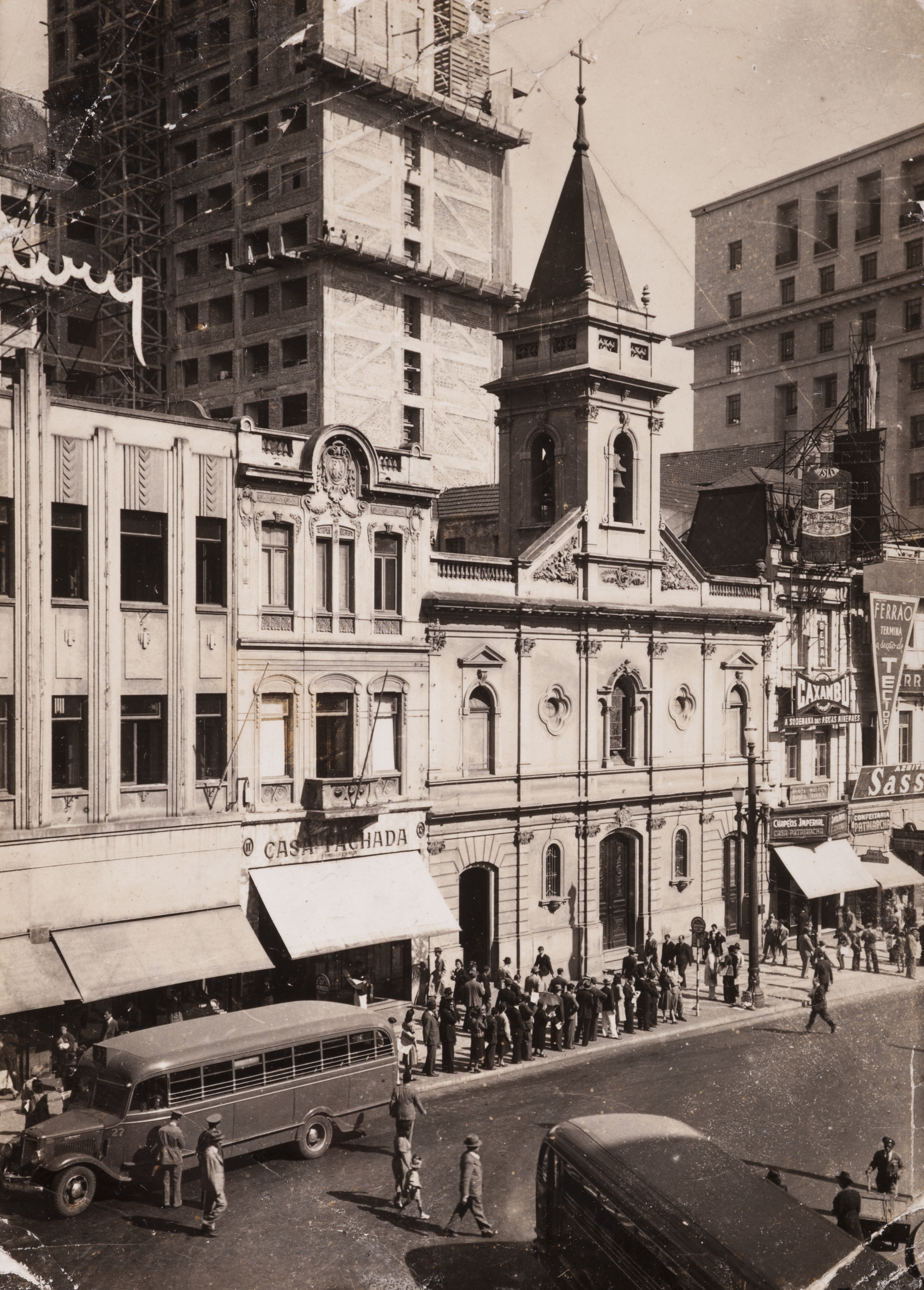 Obra que integra o acervo do Museu Paulista da USP. Coleção Werner Haberkorn - CHW